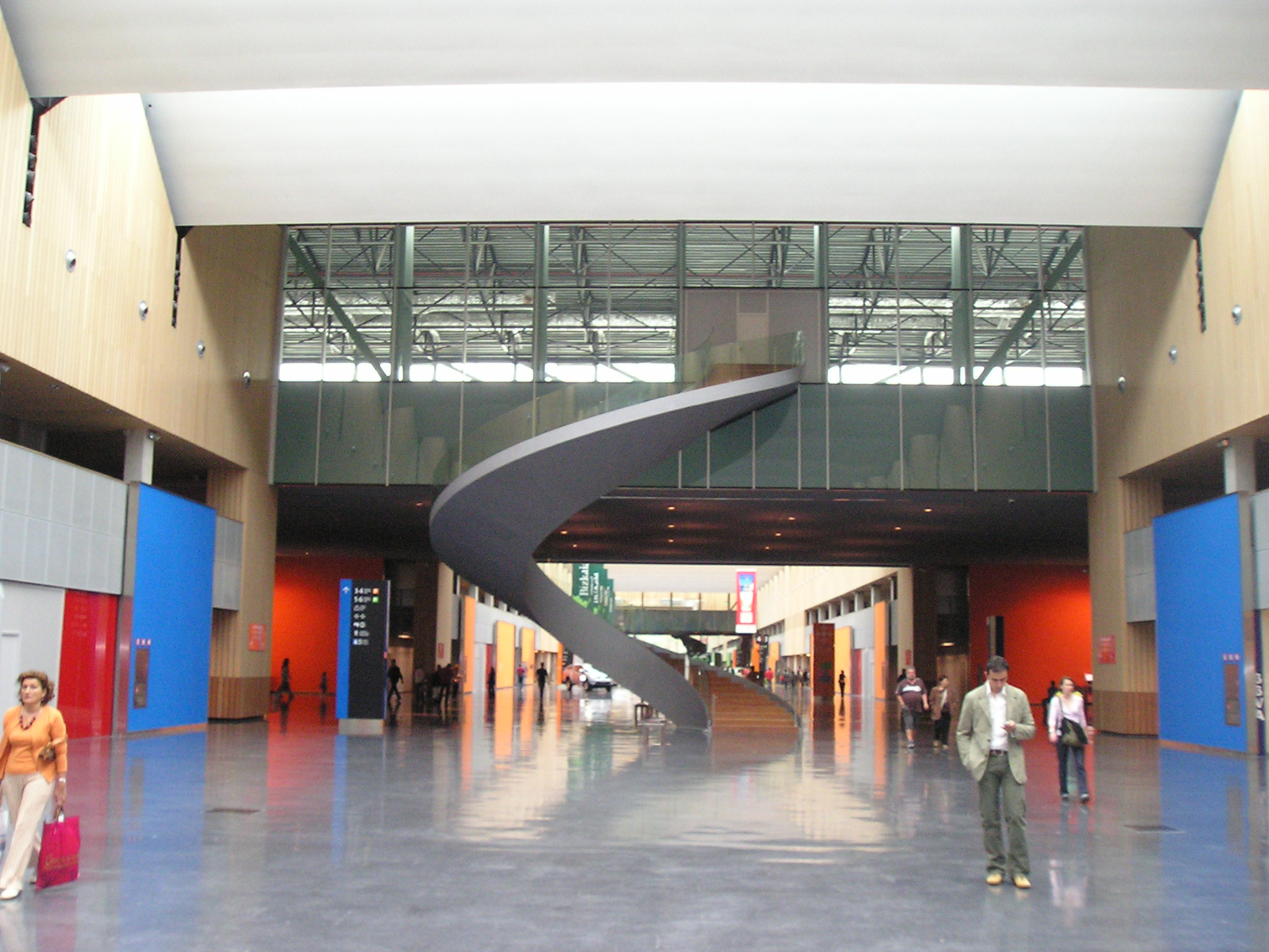 BEC barrutik.